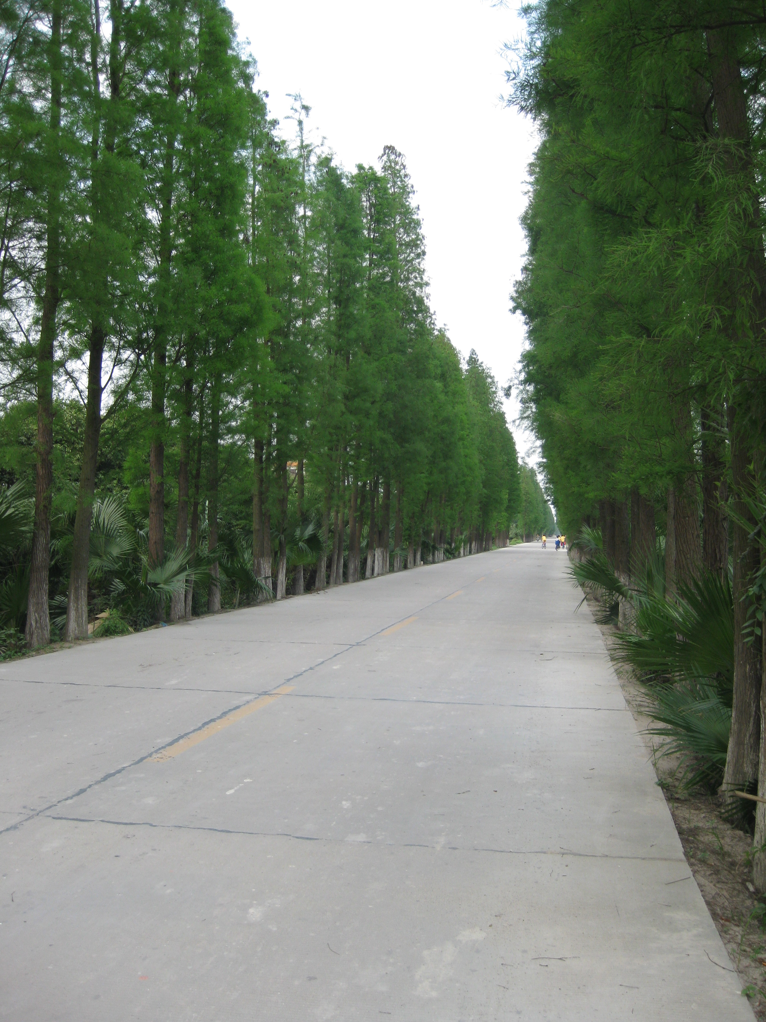 539县道新会双水段